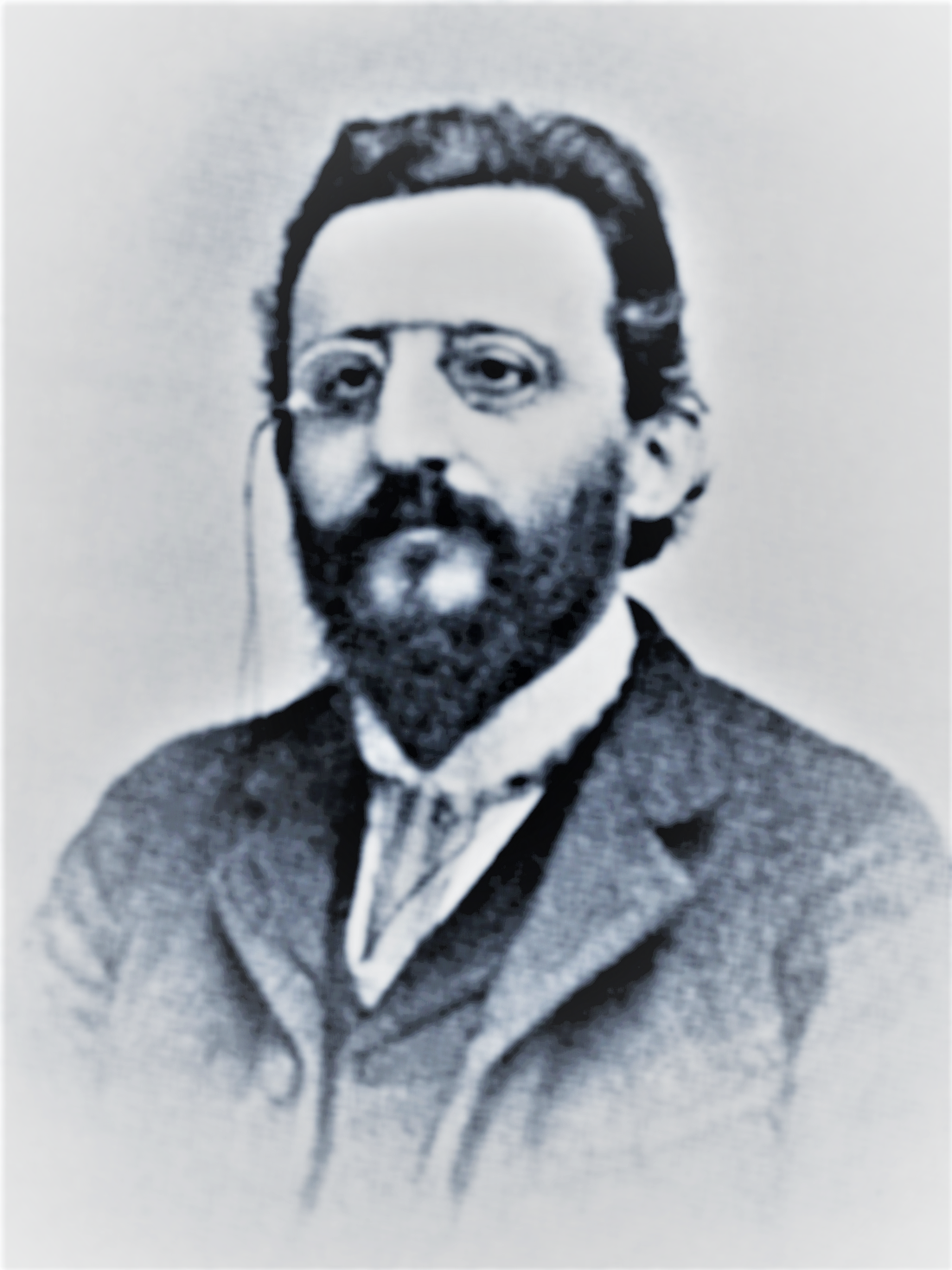 Pier Andrea Saccardo /1845-1920)